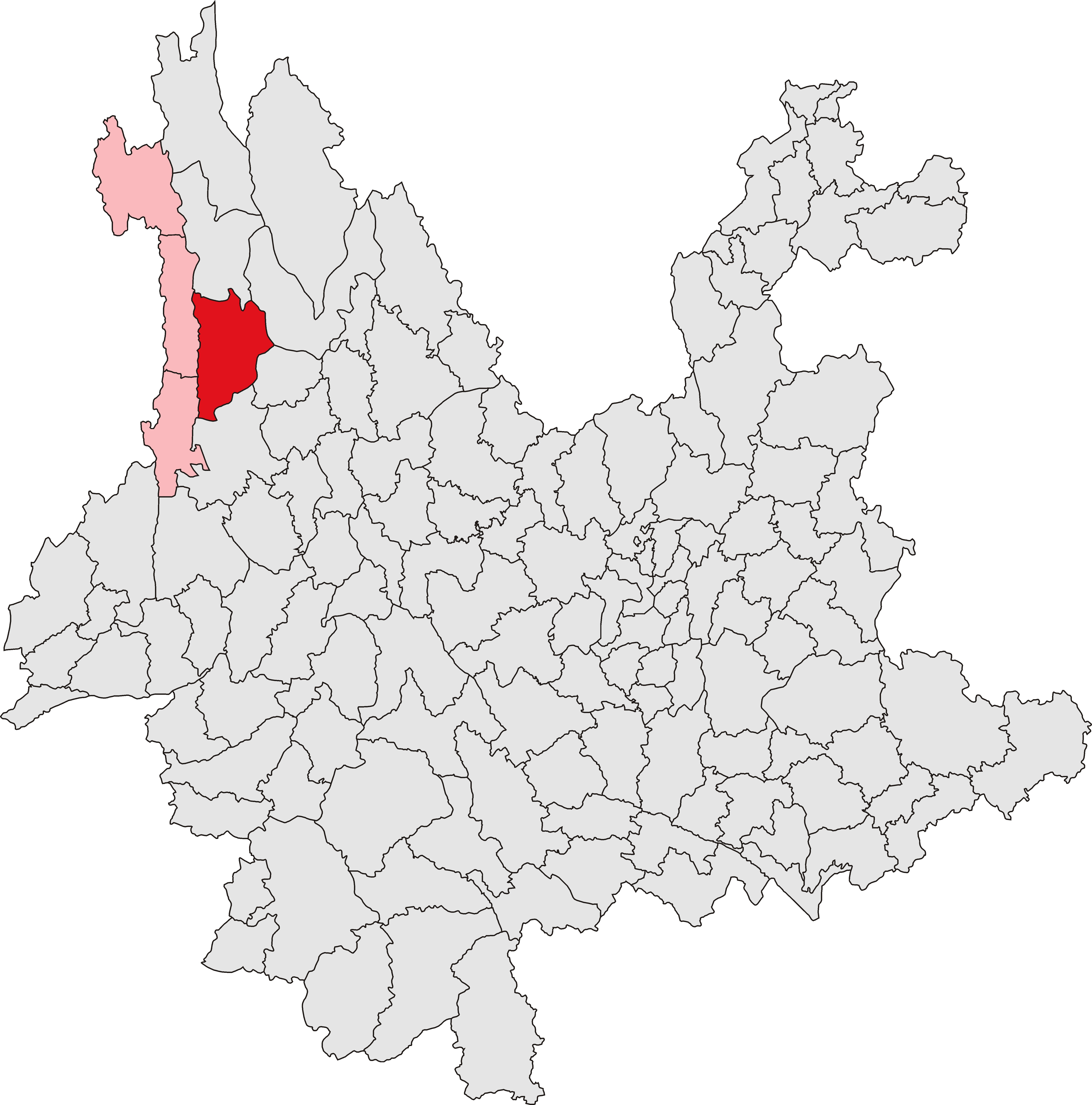 兰坪白族普米族自治县位置图